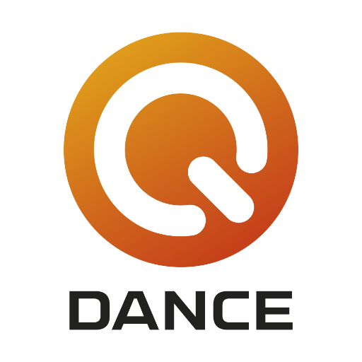 Logo des Plattenlabels Q-Dance